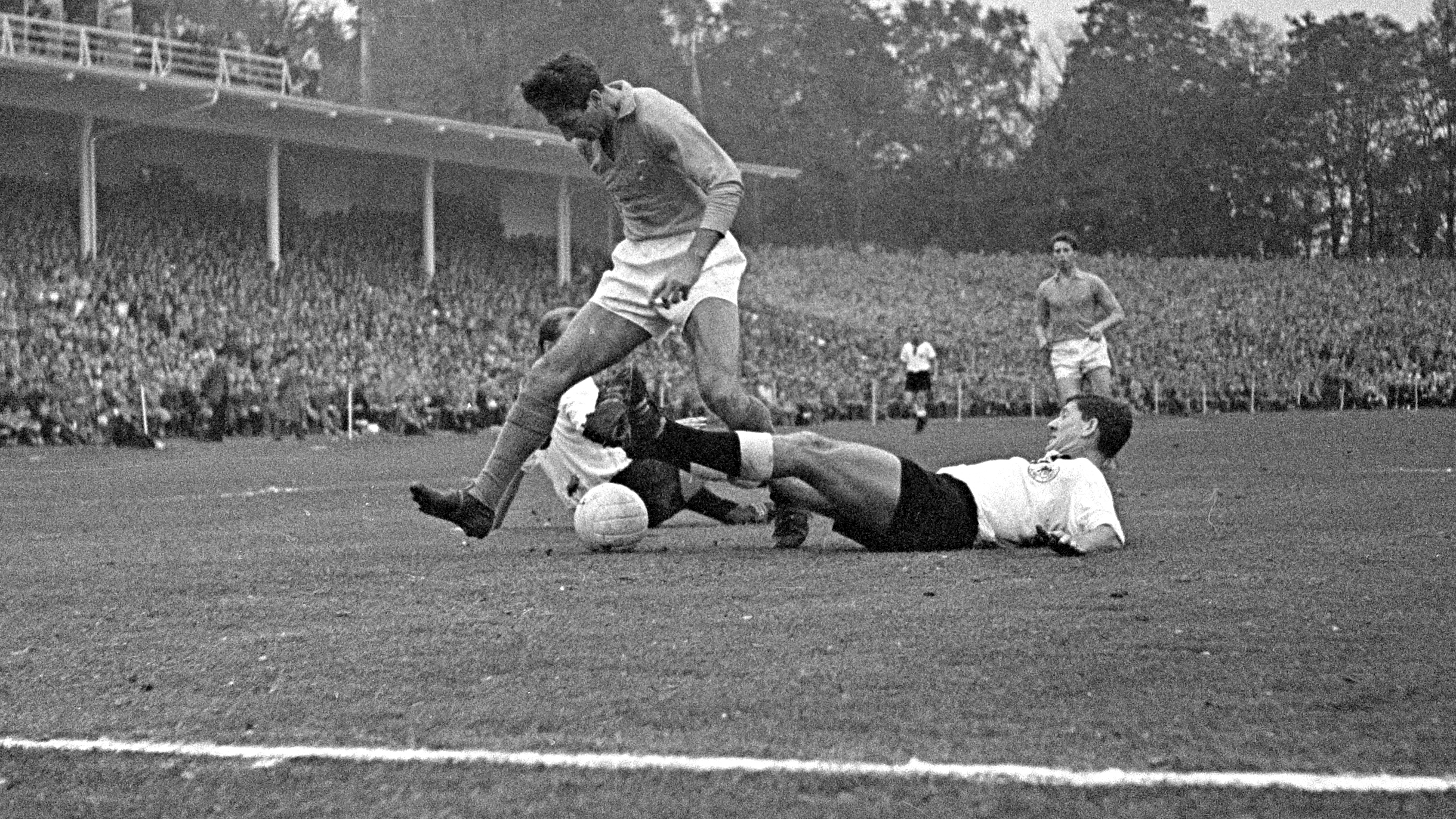 Voetbal Duitsland - Nederland 7-0 in Keulen, duel tussen Wilkes en Szymaniak. Location: Duitsland, Keulen, Nederland